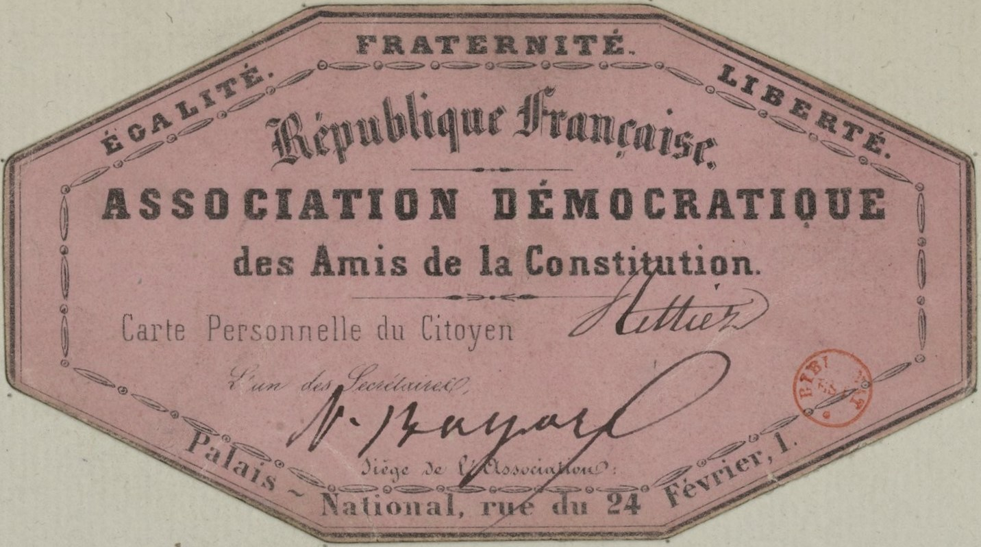 Association démocratique des amis de la Constitution. Carte de membre de François Rittiez signée par Bayard, secrétaire.